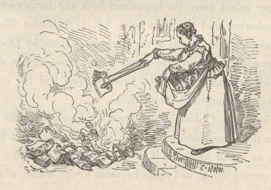 "A queima dos livros" (1863), iIustração por Gustave Doré para “Don Quixote“ de Miguel de Cervantes.